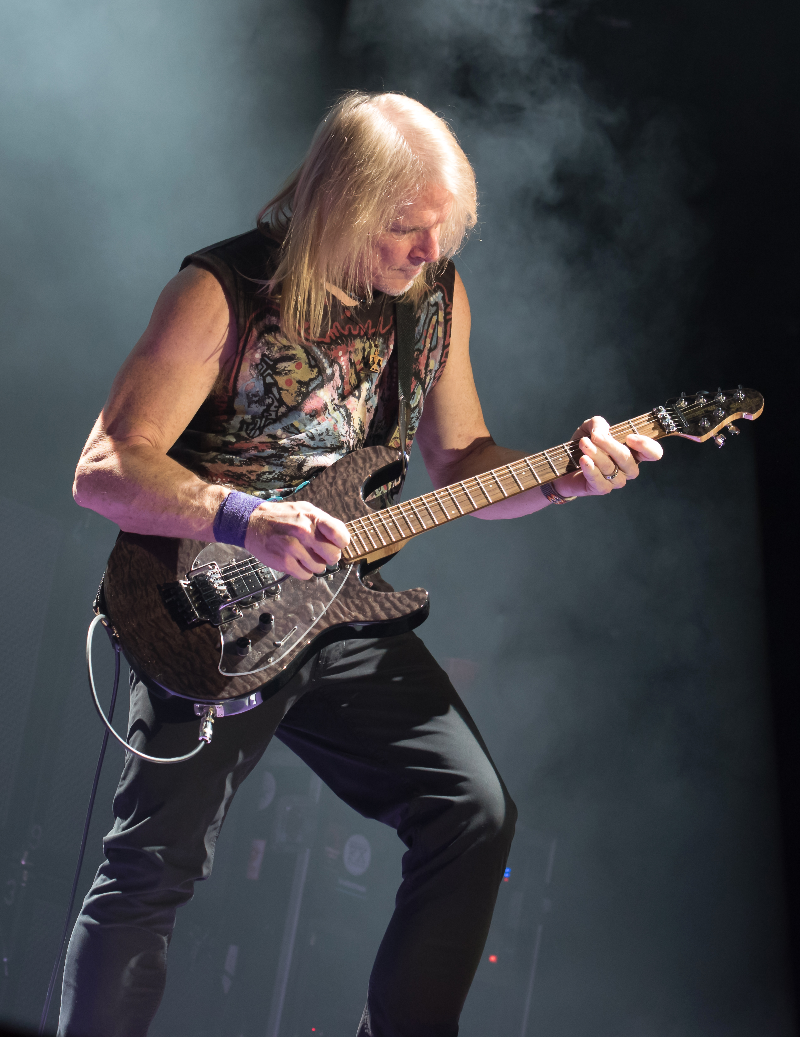 Steve Morse von Deep Purple bei der inFinite "The Long Goodbye Tour" in der Barclaycard Arena in Hamburg 2017